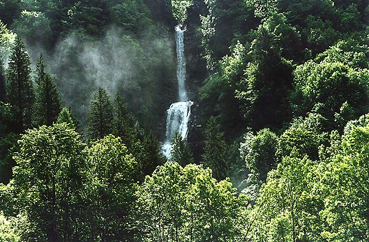 Diesbachfall, Kanton Glarus, Schweiz